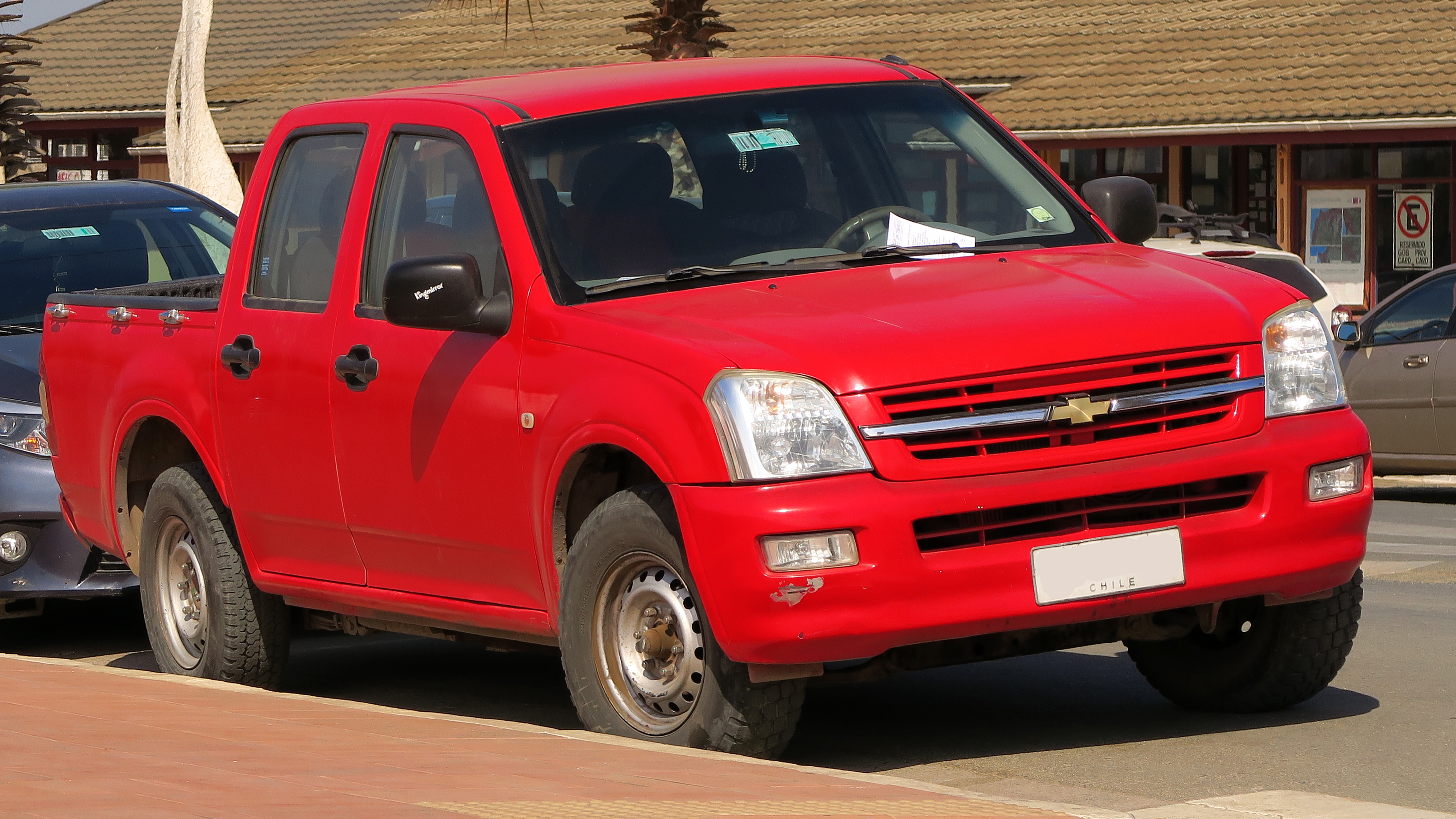 Chevrolet Luv D-Max 3.0L TDi 2006